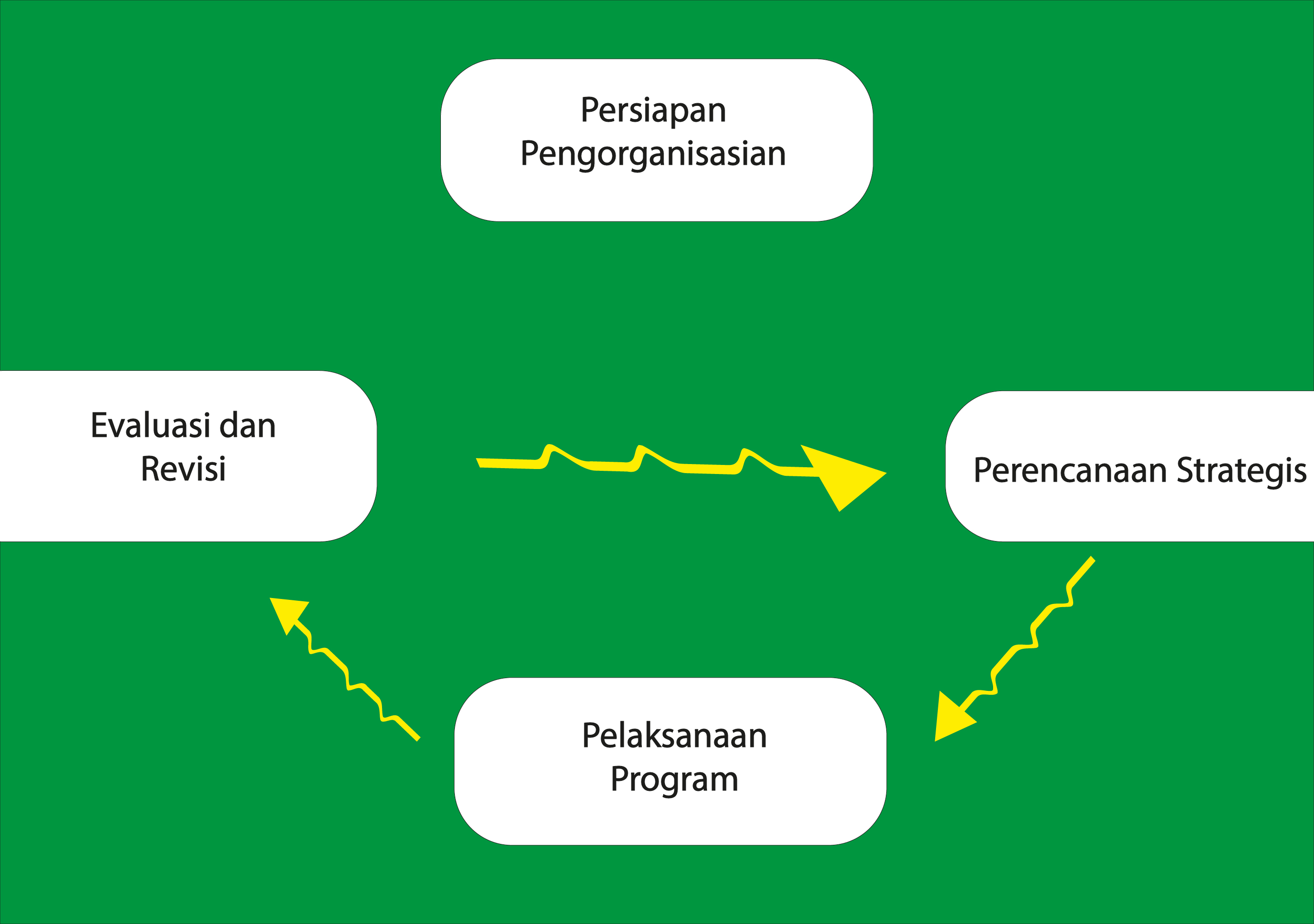 Sumber: Badan Planologi Kehutanan dan Perkebunan, tanpa tahun dikutip tahun (2002)